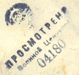 Оттиск печати "Просмотрено военной цензурой в/ч 04180". НКО СССР. Письмо-треугольник с фронта Великой Отечественной войны.